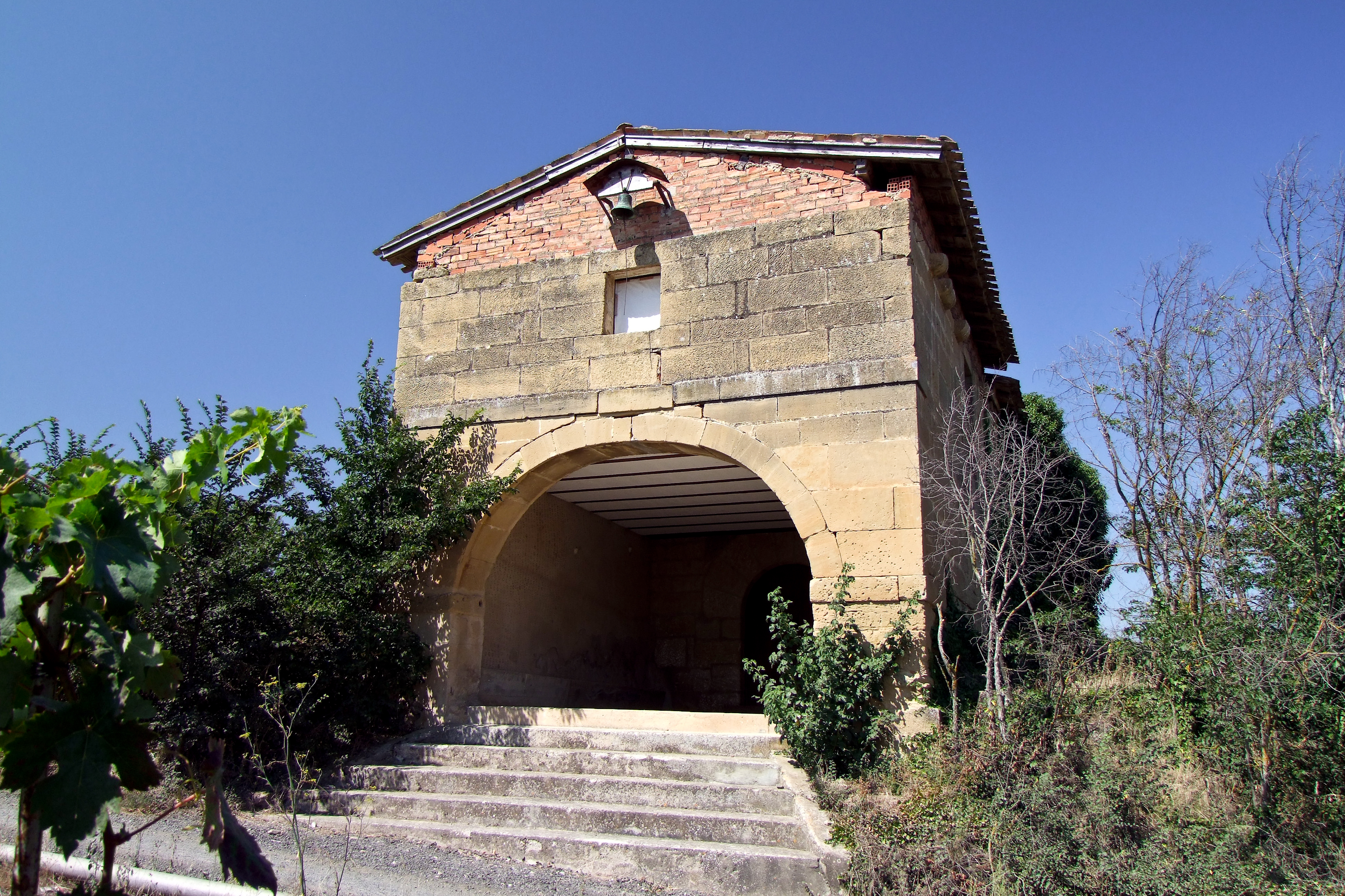 Ermita de Santa Lucía en la localidad de Briones, La Rioja - España